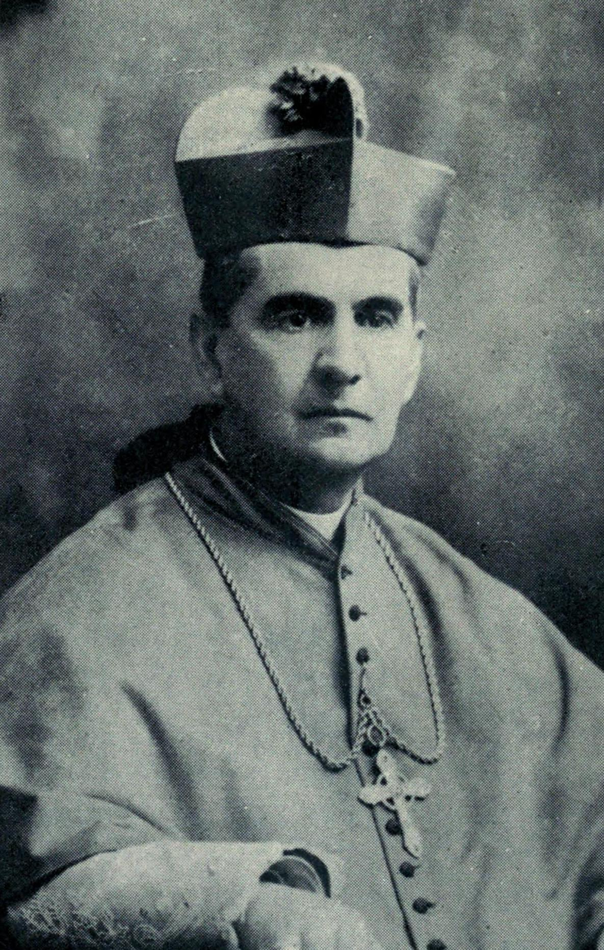 Luís Silva Lezaeta